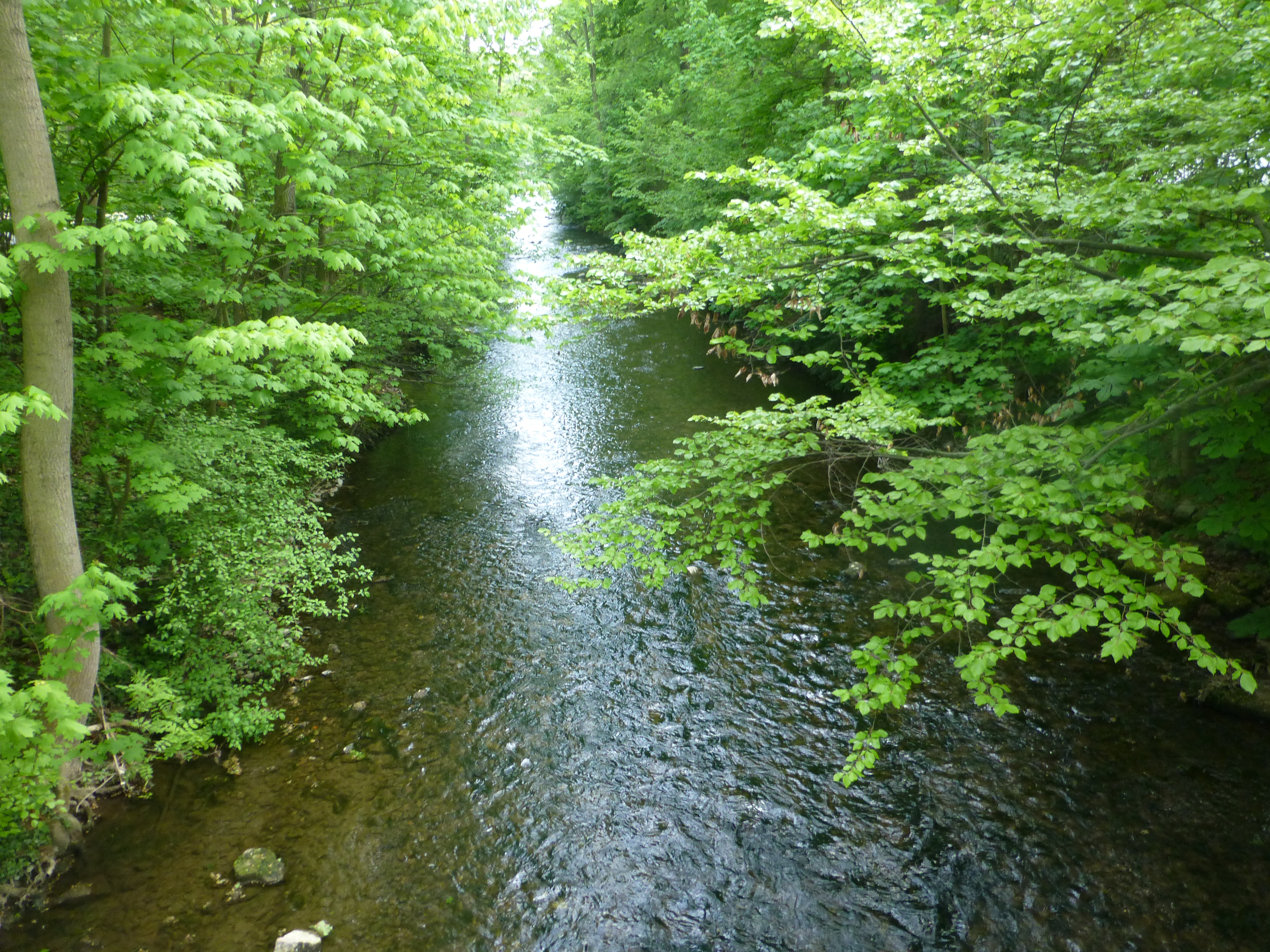 Die Gera in Arnstadt im südlichen Stadtgebiet